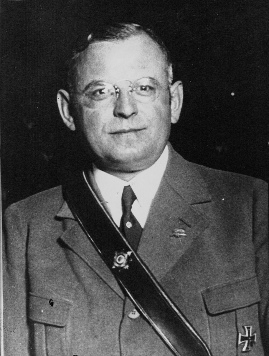 Franz Seldte, fundador y líder federal de Der Stahlhelm, Federación de Soldados del Frente, 1933.